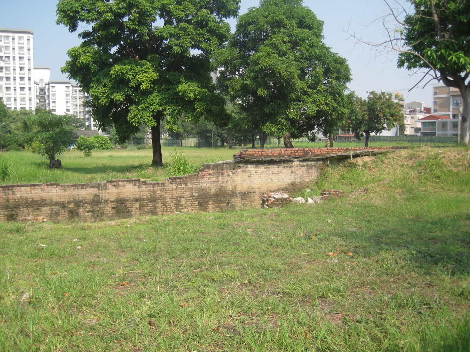 中文（台灣）: 位在臺南市北區三分子的日軍射擊場遺址。